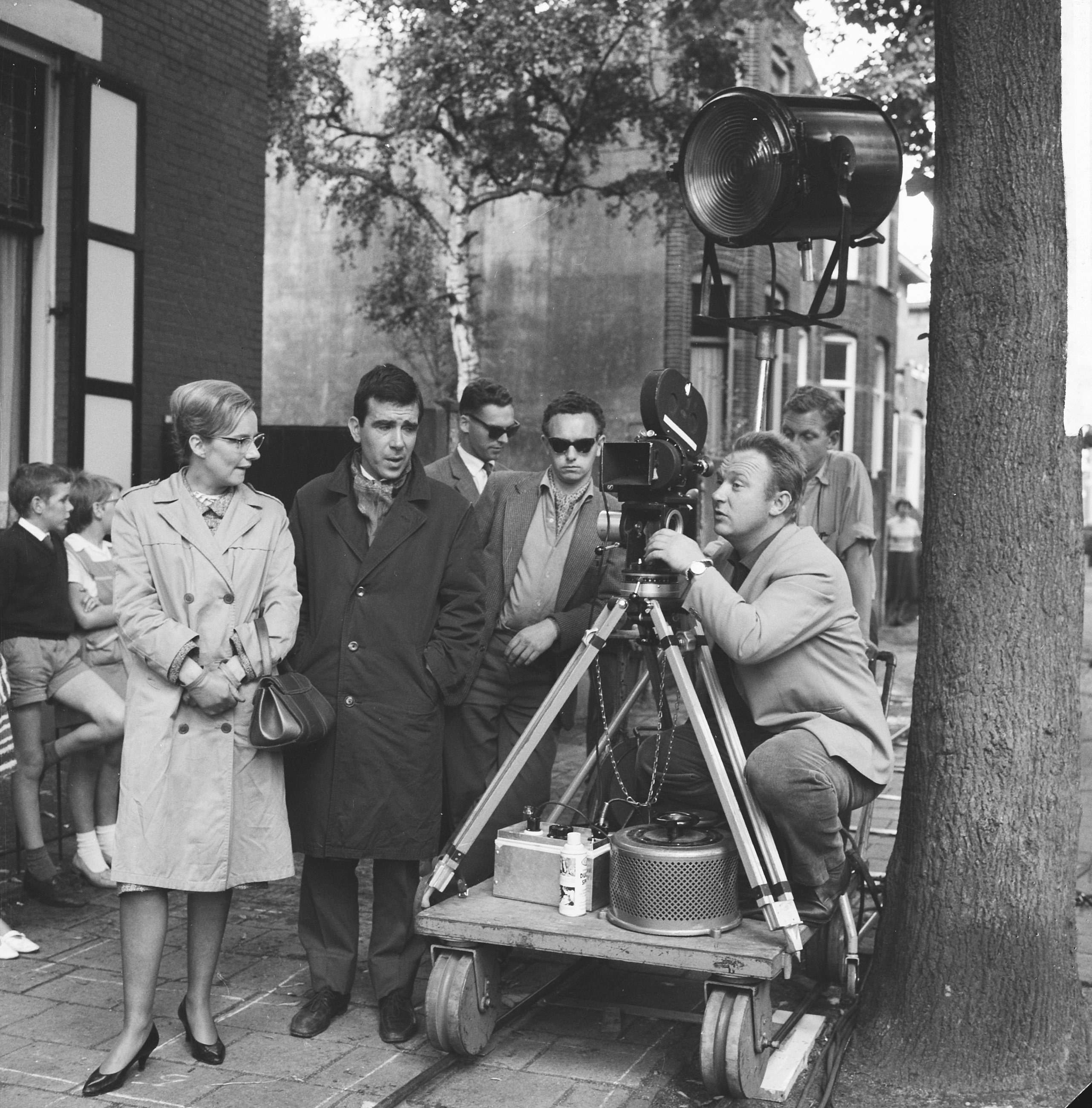 Filmopname "Kermis in de Regen" in Breda. Achter de camera regisseur Kees Brusse. Links Andrea Domburg en Wim van den Heuvel Datum 20 juli 1961